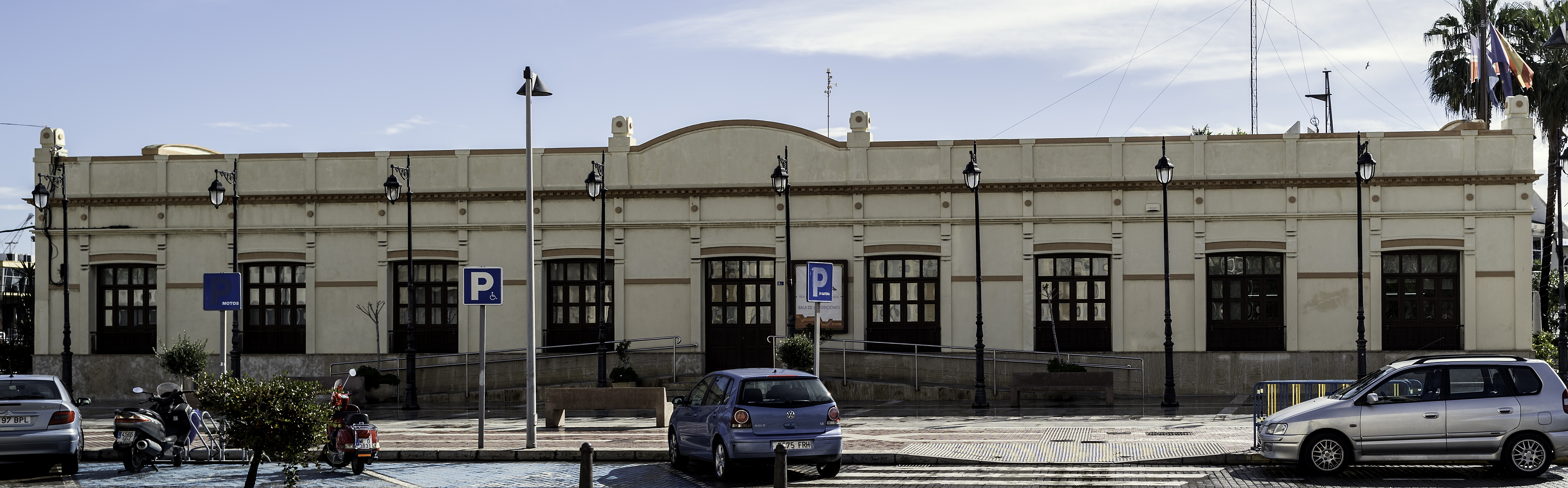 Club Marítimo de Melilla (antigua Estación sanitaria).- Es un edificio modernista ​del Ensanche de la ciudad española de Melilla. Está situada en el Paseo General Macías y forma parte del Conjunto Histórico Artístico de la Ciudad de Melilla, un Bien de Interés Cultural.